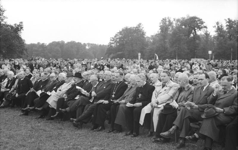 Zentralbild 11.7.1954 Deutscher Evangelischer Kirchentag in Leipzig vom 7. bis 11.7.1954 Die Hauptversammlung auf der Rosentalwiese am 11.7. Bildmitte der Stellvertreter des Ministerpräsidenten und Vorsitzenden der CDU Otto Nuschke, daneben links: Präsident des Evangelischen Kirchentages D.Dr. Reinhold von Thadden-Trieglaff, der Amtierende Präsident der DDR und Präsident der Volkskammer Dr.h.c. Johannes Dieckmann und Bischof D.Dr. Otto Dibelius.